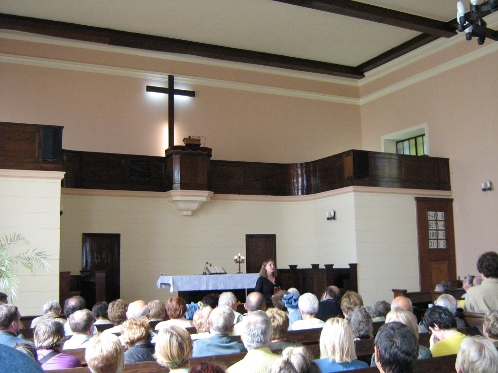 Kościół Ewangelicko-Reformowany w Łodzi